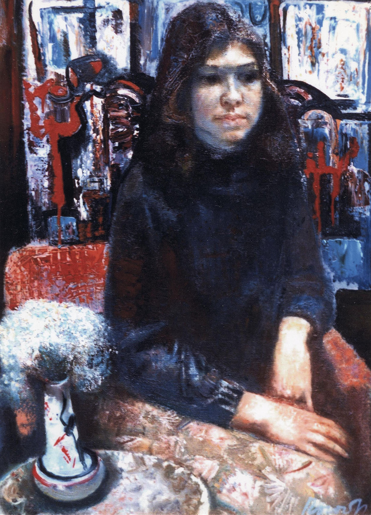 Александр Пономарев. Портрет девушки. 1991